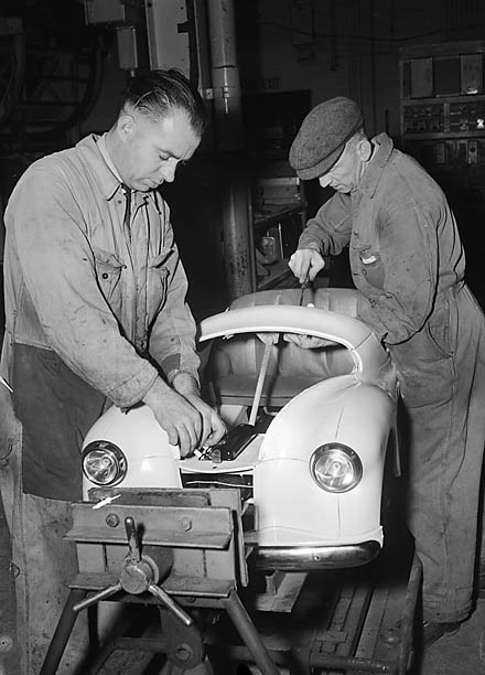 Teitl Cymraeg/Welsh title: [Ffatri] Ceir Tegan, Pengam, Bargoed. Ffotograffydd/Photographer: Geoff Charles (1909-2002) Dyddiad/Date: 09/11/1951 Cyfrwng/Medium: Negydd ffilm / Film negative Cyfeiriad/Reference: (gch02333) Rhif cofnod / Record no.: 3368294 Rhagor o wybodaeth am gasgliad Geoff Charles yn Llyfrgell Genedlaethol Cymru More information about the Geoff Charles Collection at the National Library of Wales Mae ffotograffau Geoff Charles hefyd yn rhan o Broject Europeana Libraries Geoff Charles' photographs also form part of the Europeana Libraries Project